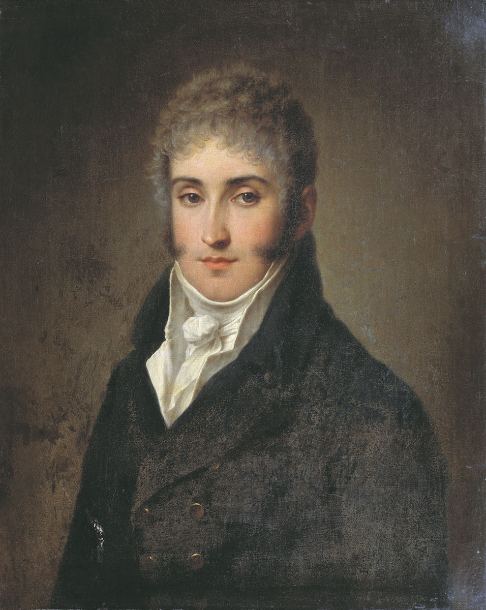 Adam Jerzy Czartoryski (1770-1861)